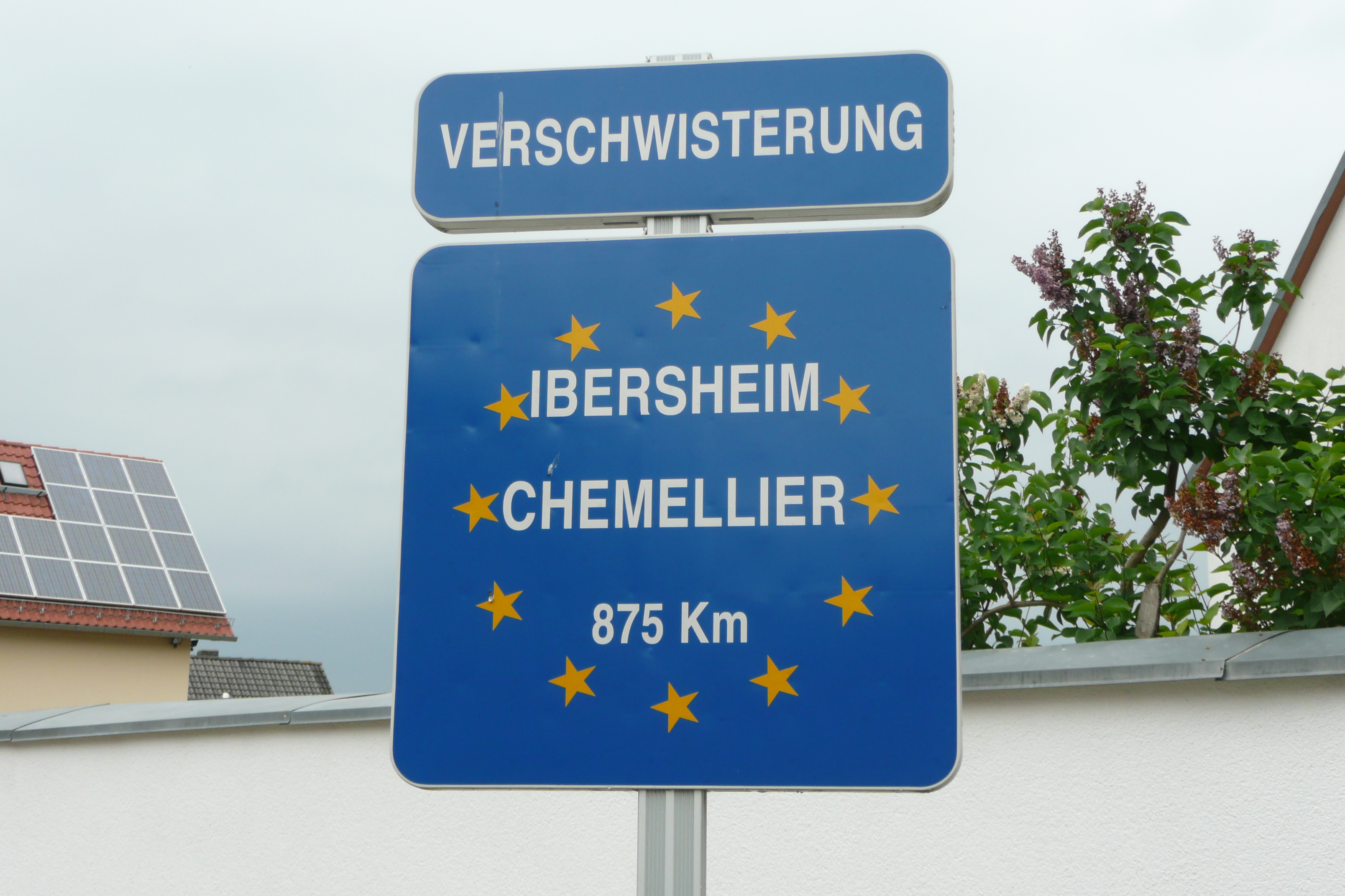 Schild an Straßenkreuzung